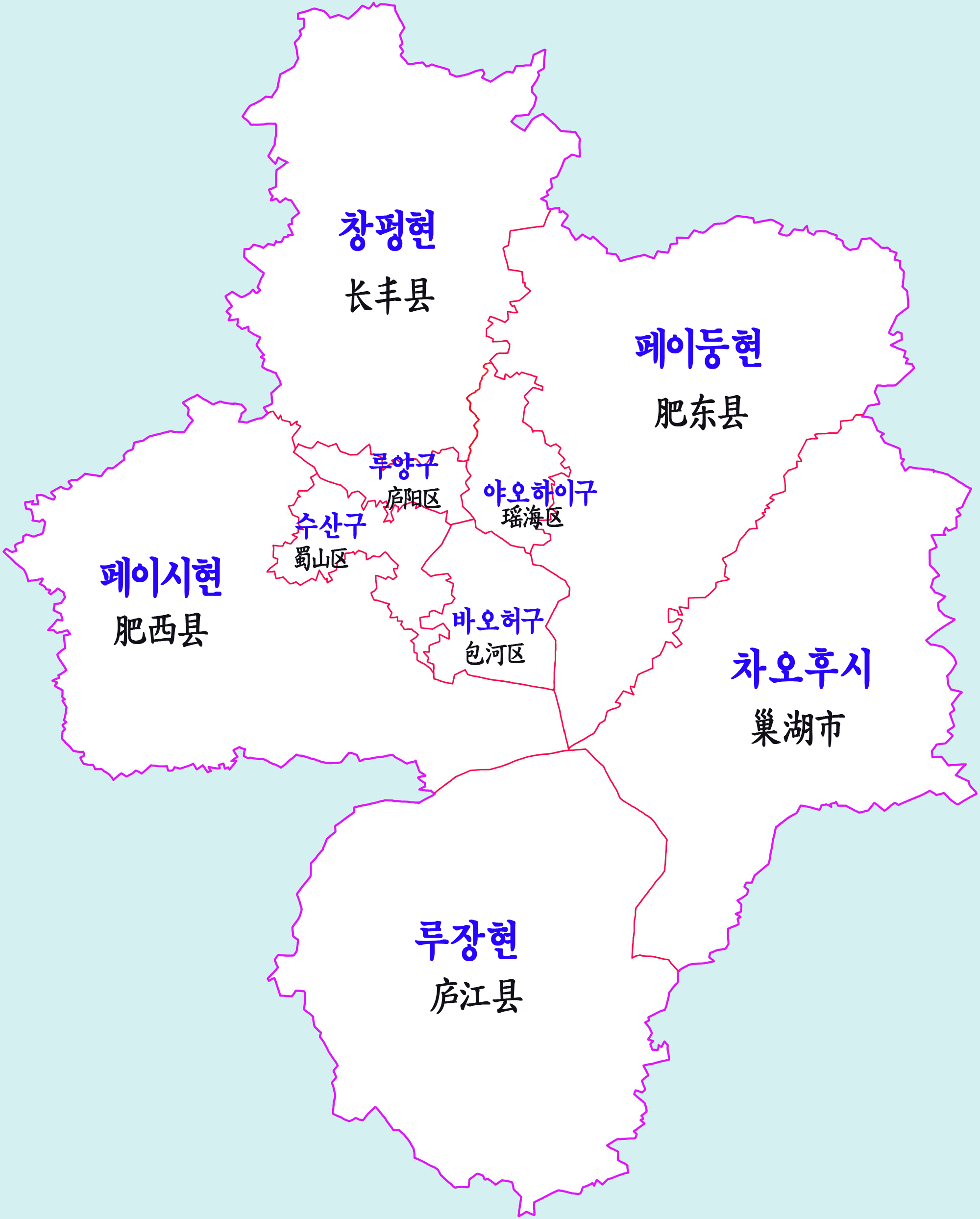 허페이시 행정구역도